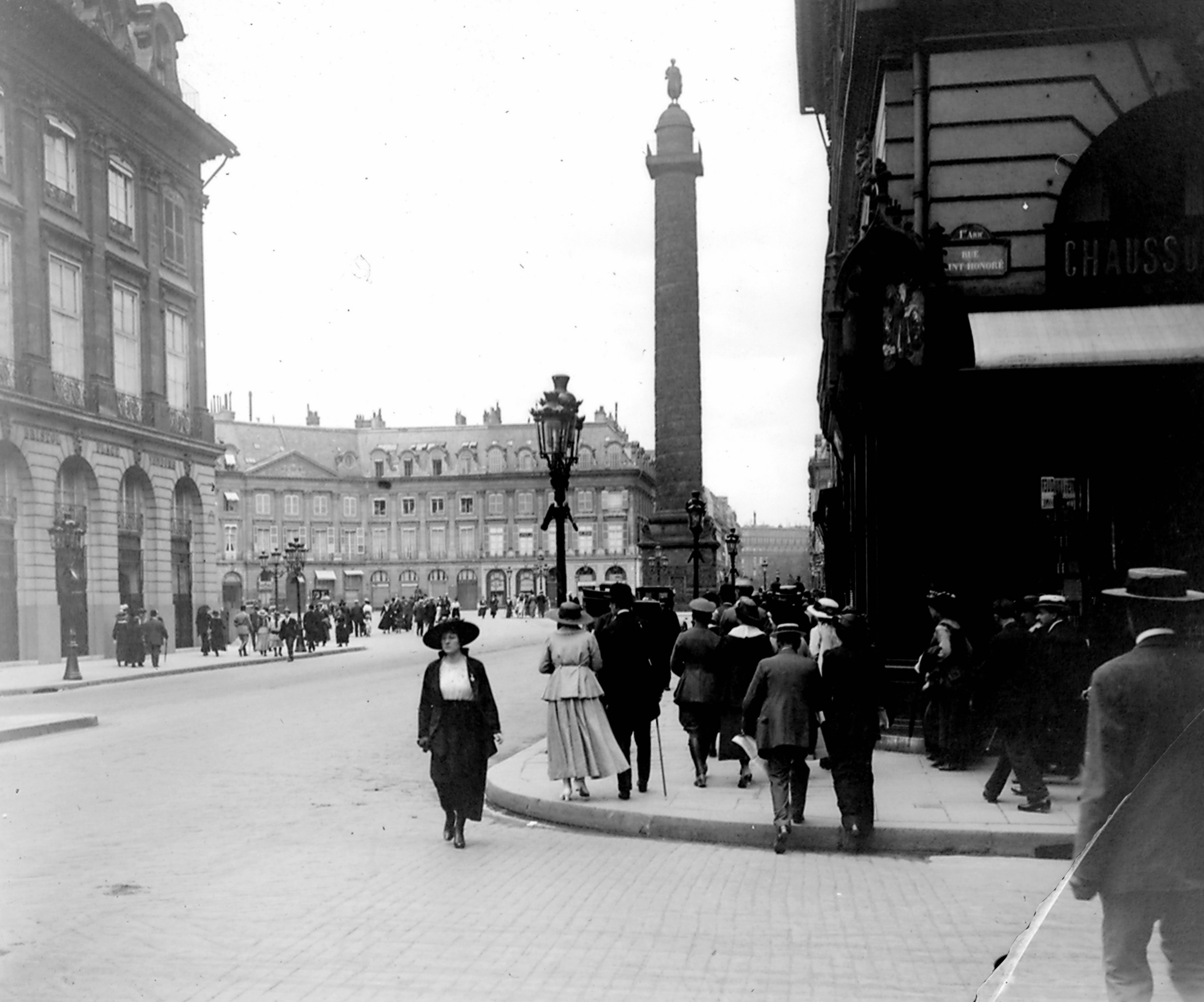 Pari, Place Vendôme - Photo prise par mon grand-père Maurice Terrien.